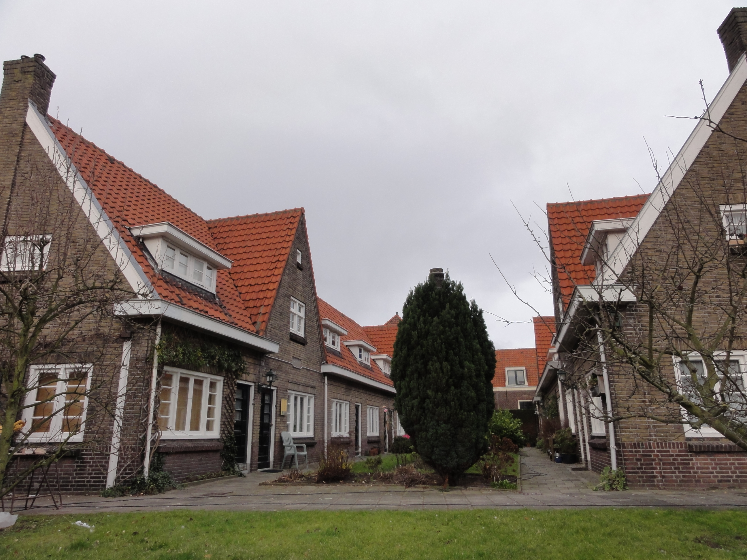 Cathrijn Jacobsdochterhofje aan de Kaarsenmakerstraat 1 te Leiden